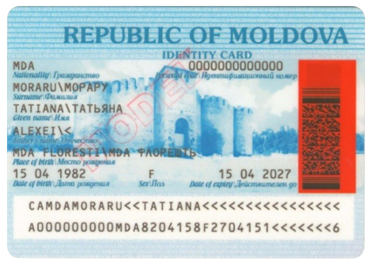 Buletin de identitate cu fişa de însoţire